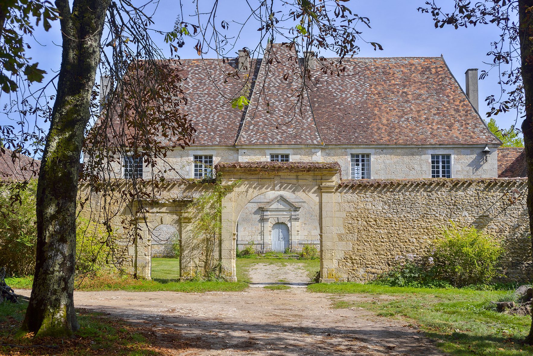 Le château de Genthiat, commune de Liorac-sur-Louyre, Dordogne, France, Europe. .